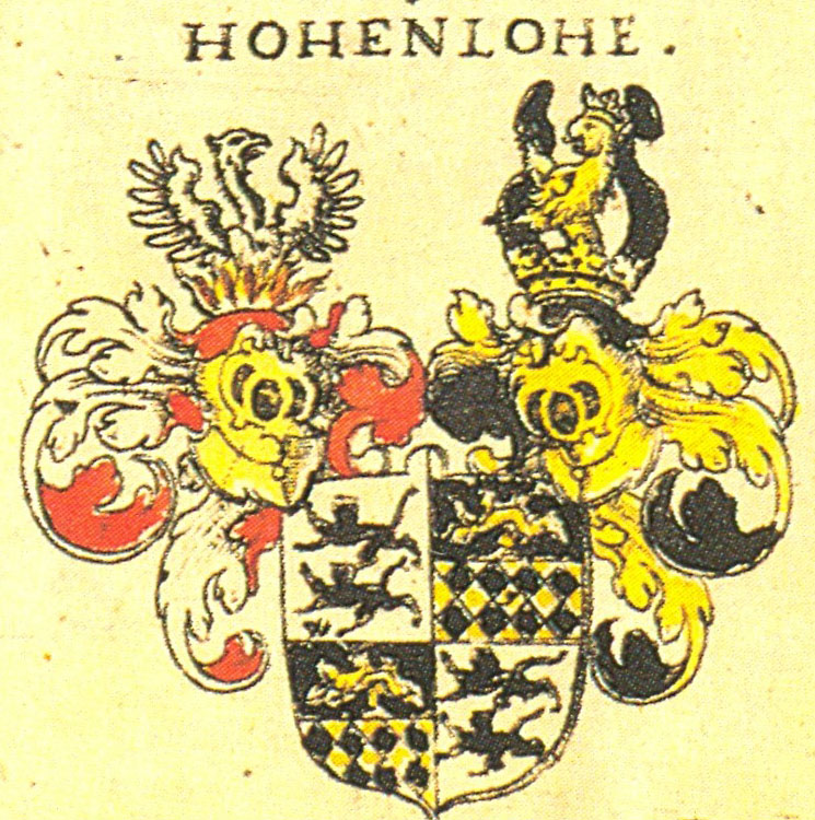 Johann Siebmacher: New Wappenbuch Grafen Hohenlohe